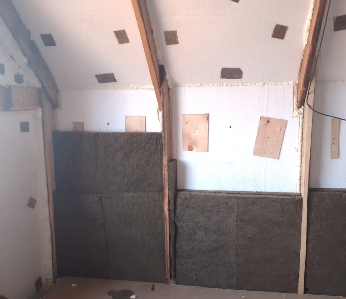 Утеплитель базалит при строительстве мансарды